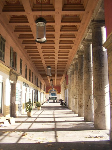 Arcades de la Place Ile de Beauté, coté est et rue Arson.